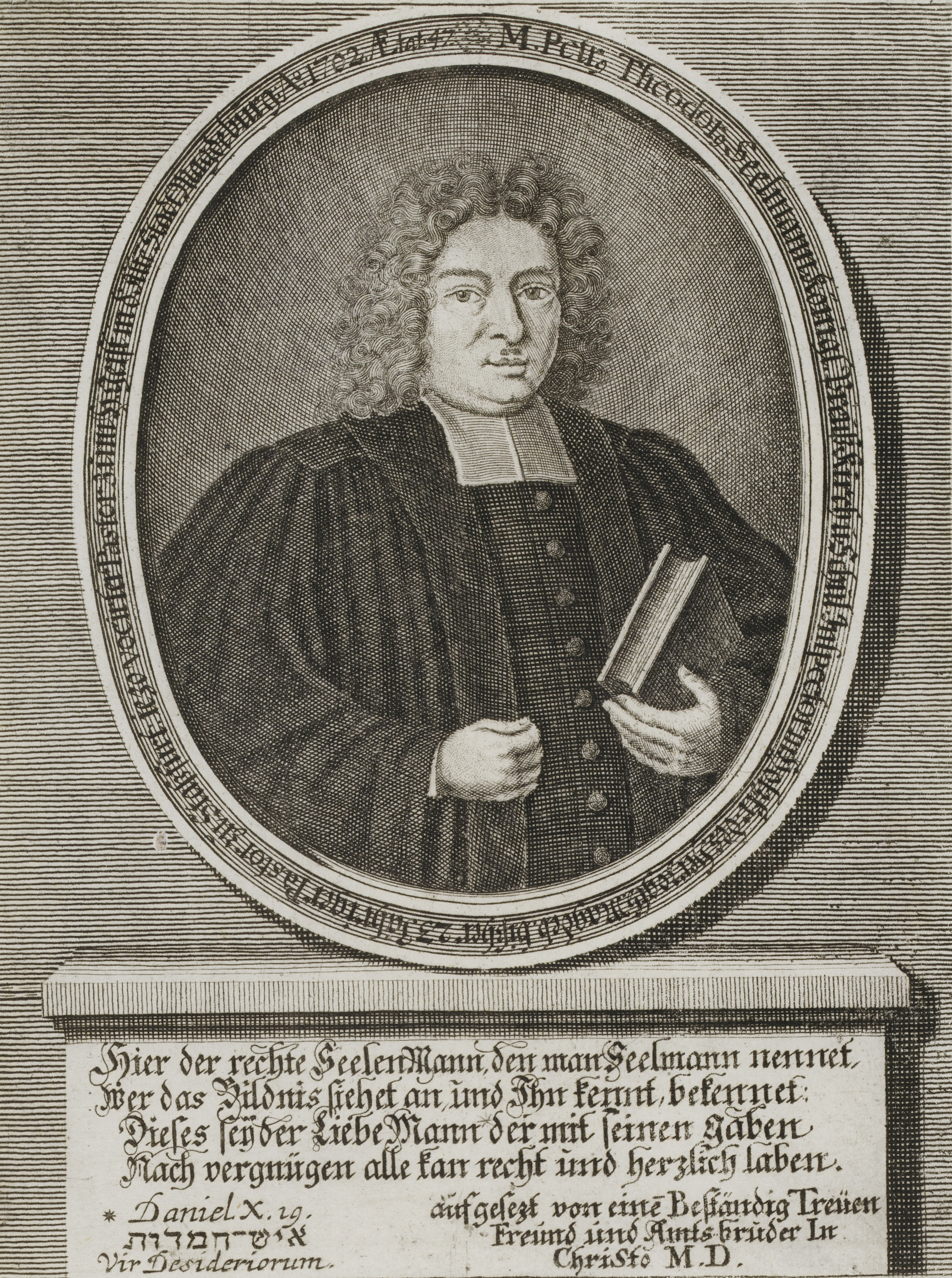 Bildnis von Peter Theodor Seelmann